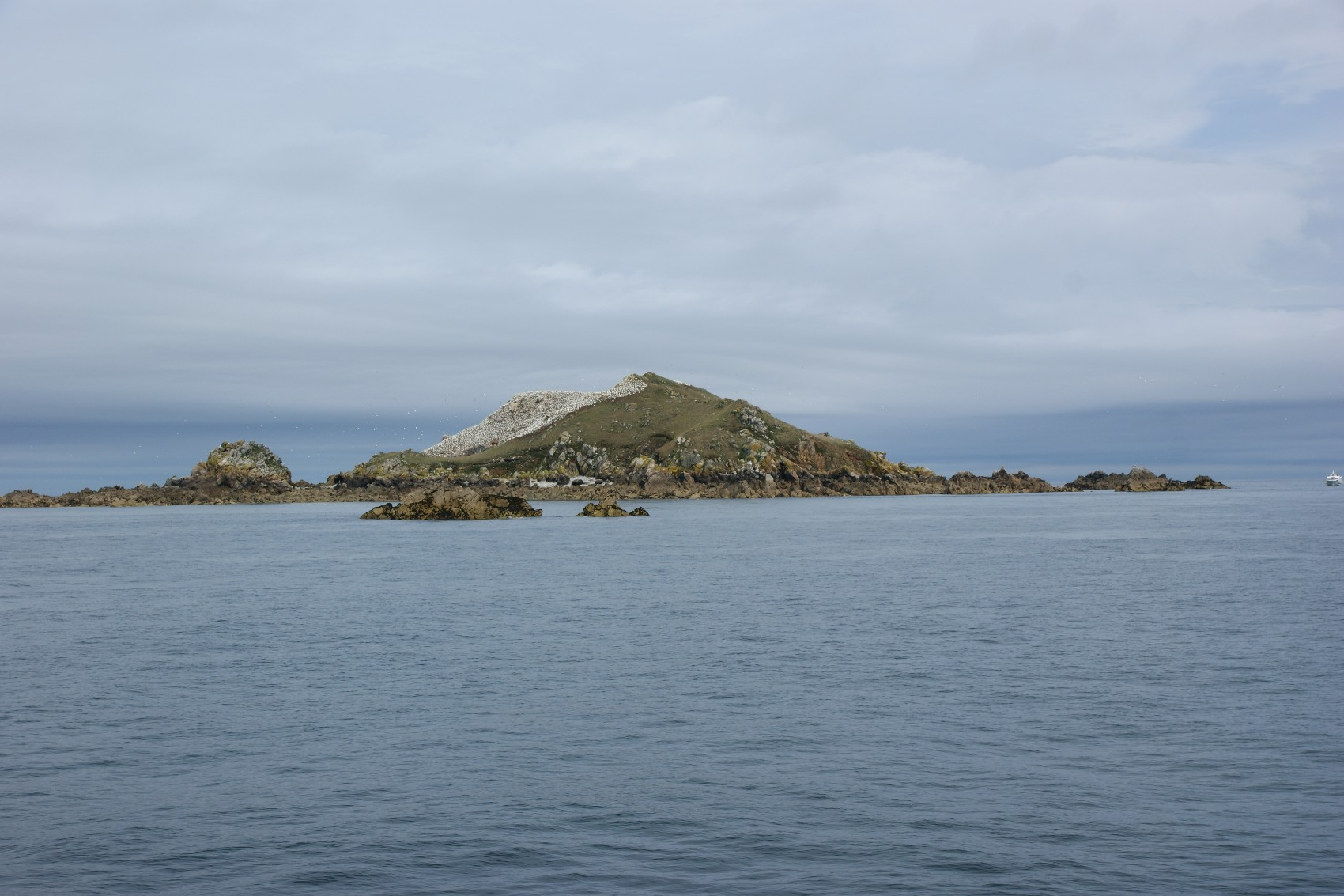 L'Île Rouzic de l'archipel des Sept-Îles